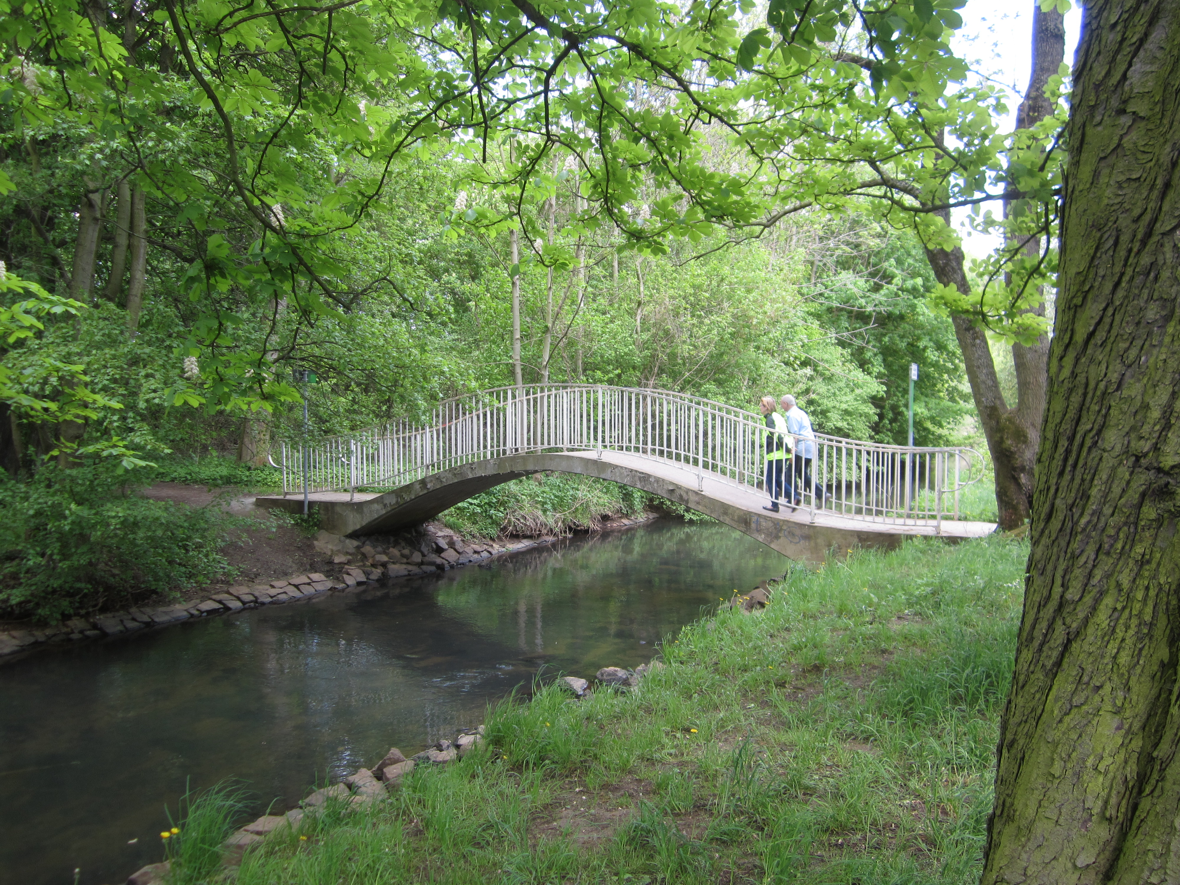 Parthenaue bei Abtnaundorf, am Abtnaundorfer Park. LSG und FFH Parthenaue